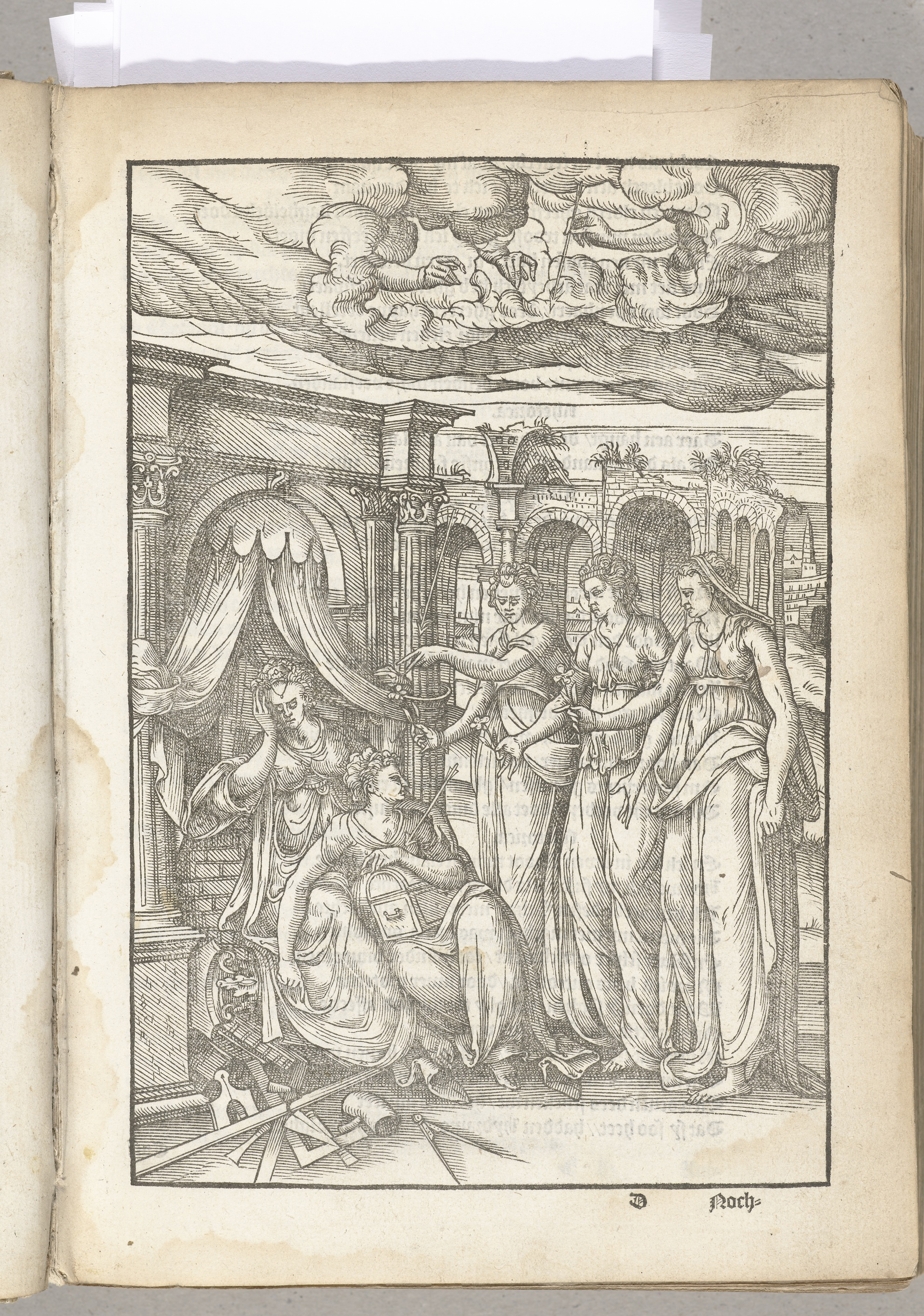 Gravure anonyme (1561-1562) représentant le blason du "Olijftak", lors du landjuweel d'Anvers de 1561.